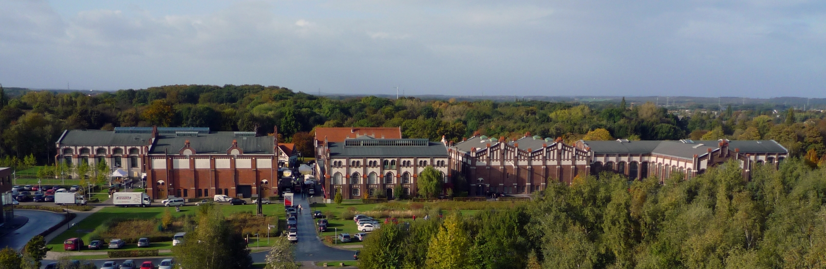 Zeche Waltrop. Übersichtsaufnahme